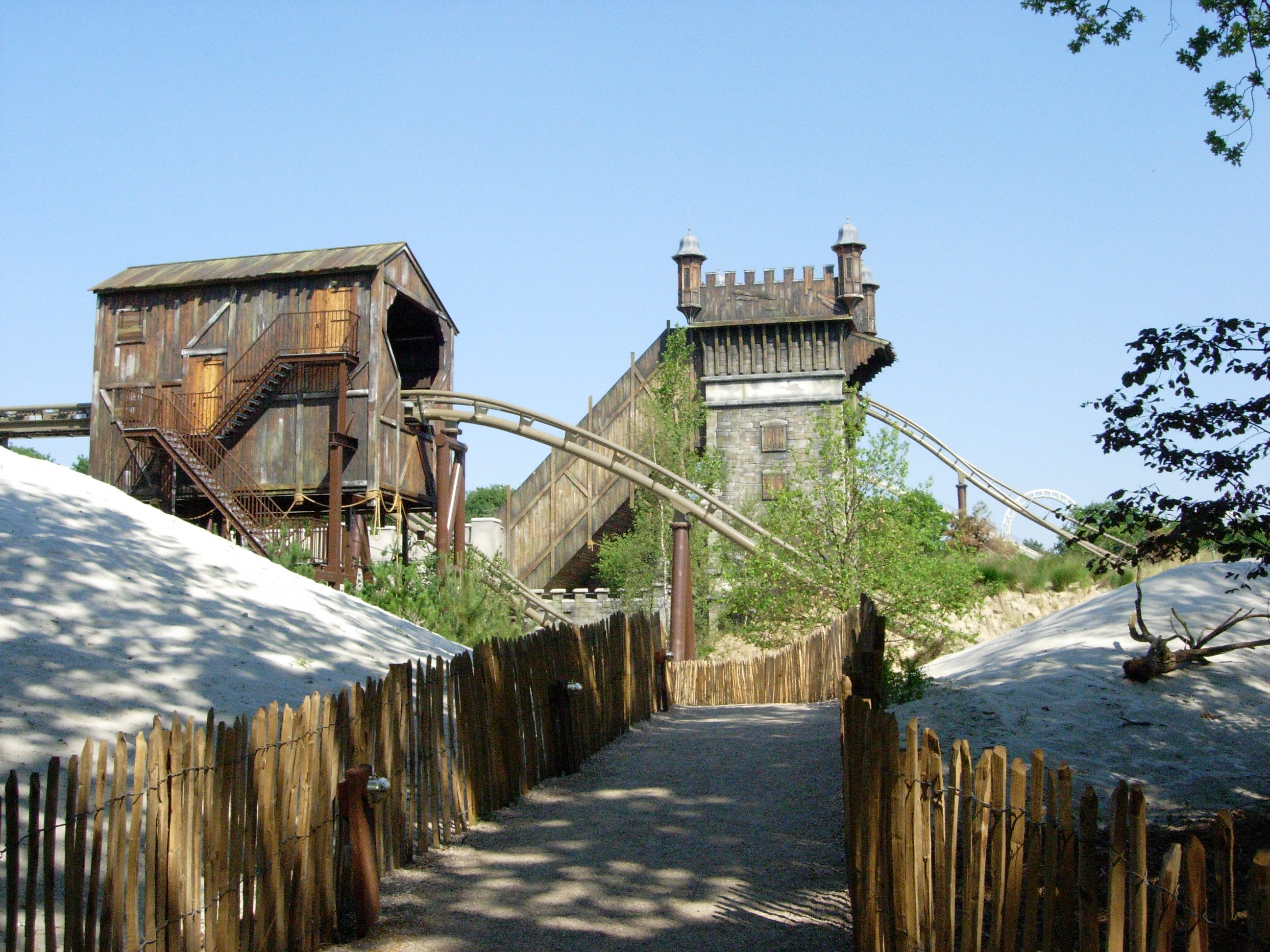 Façade ouest du Vliegende Hollander